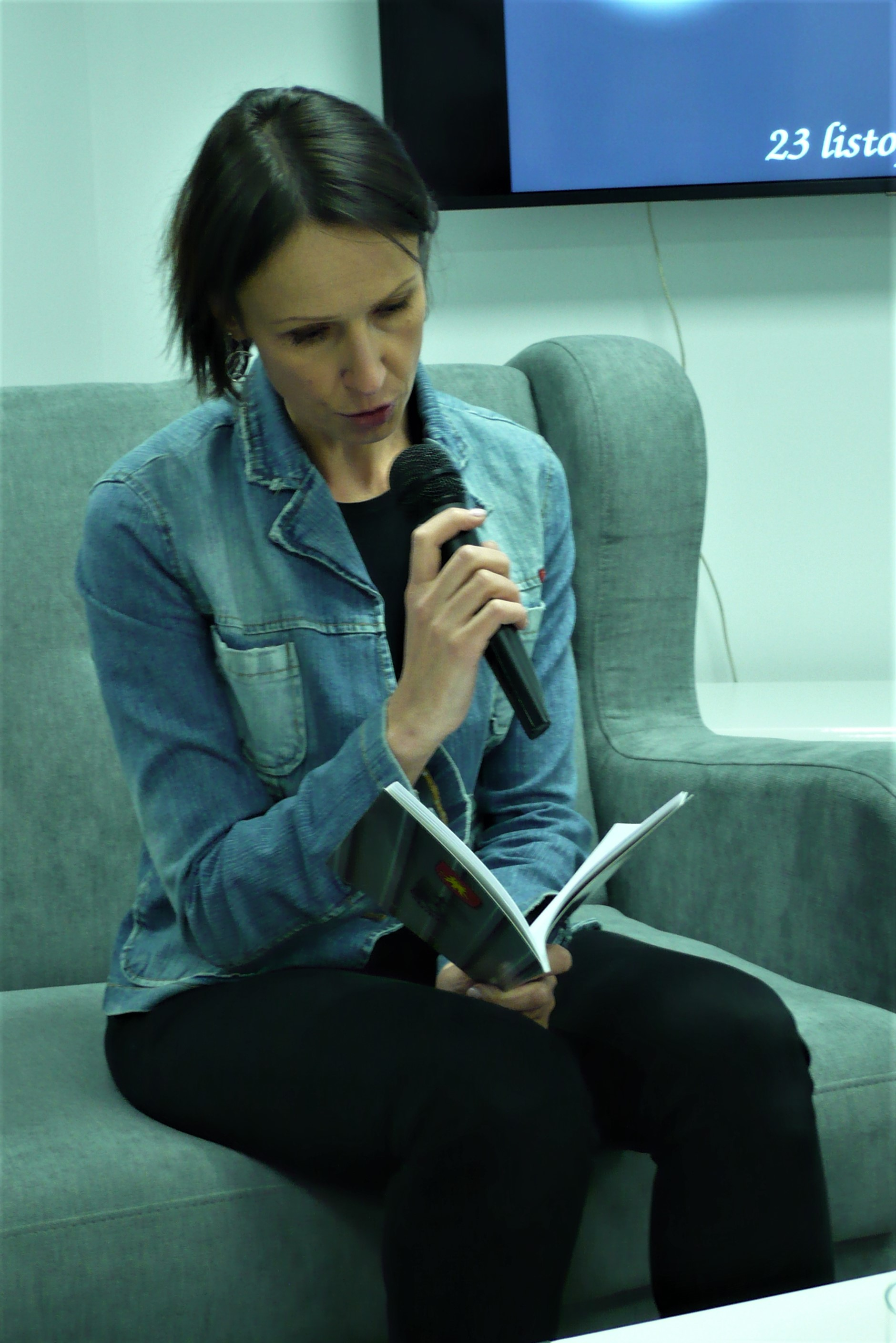 Marzena Jaworska, Noworudzkie Spotkania z Poezją, 23.11.19